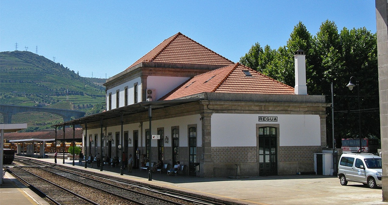 Régua